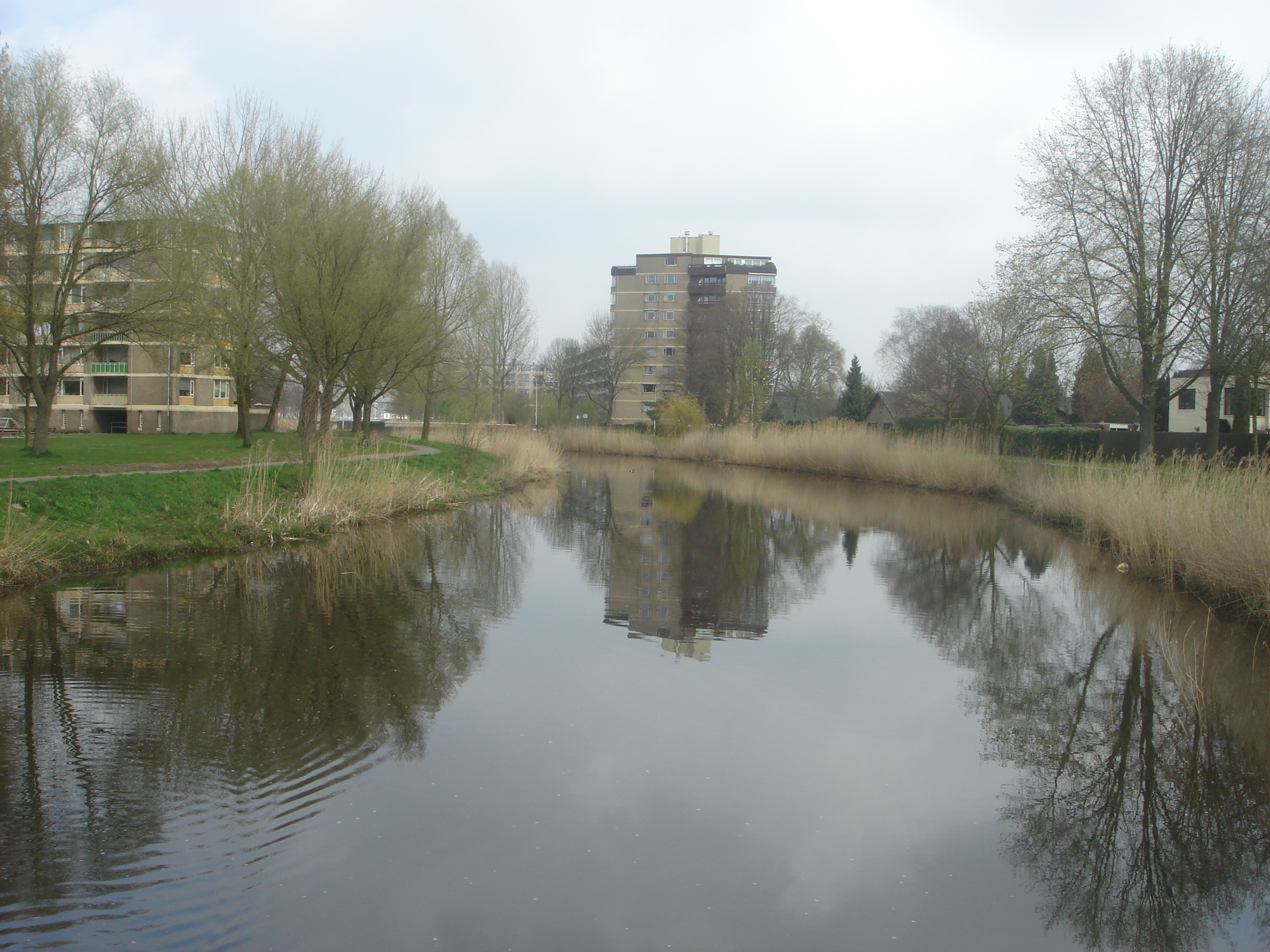 Valleikanaal, Amersfoort